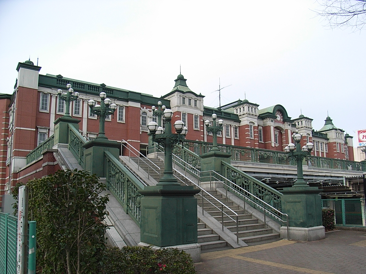 Fukaya Station (South Entrance) on JR Takasaki Line. (1-1-1,Nishijimacho,Fukaya-shi,Saitama-ken,JAPAN)